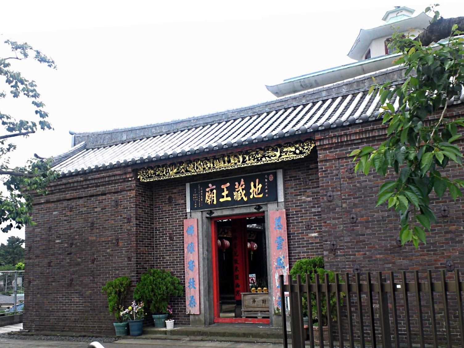 地蔵王廟（神奈川県横浜市）